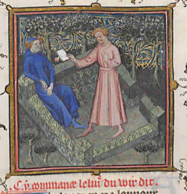 Iluminura Guillaume de Machaut et messager de sa dame de Le Livre du Voir Dit nas obras completas de Guillaume de Machaut